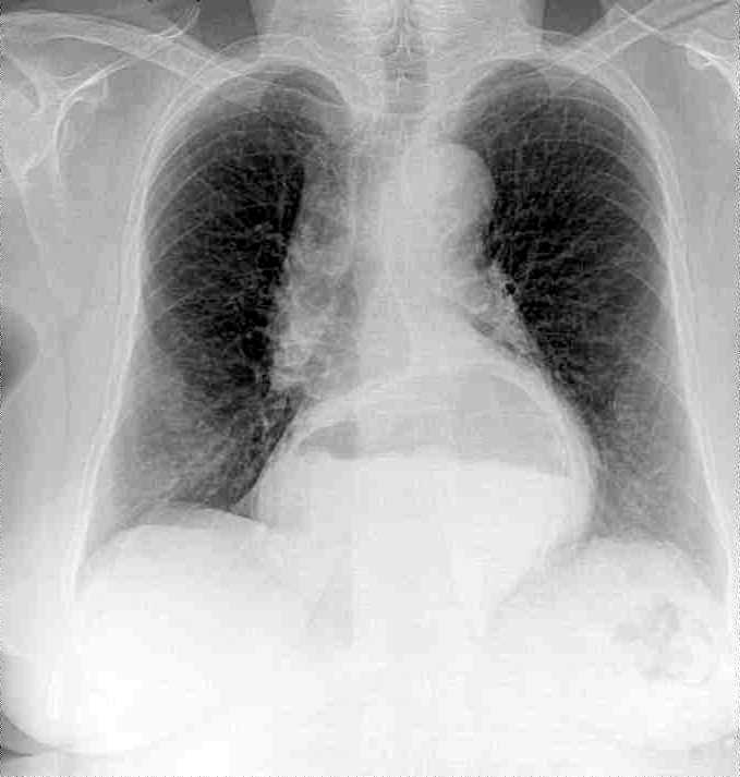 Una radiografía a los pulmones a una paciente de Santa Cruz, Chile. Versión cortada.